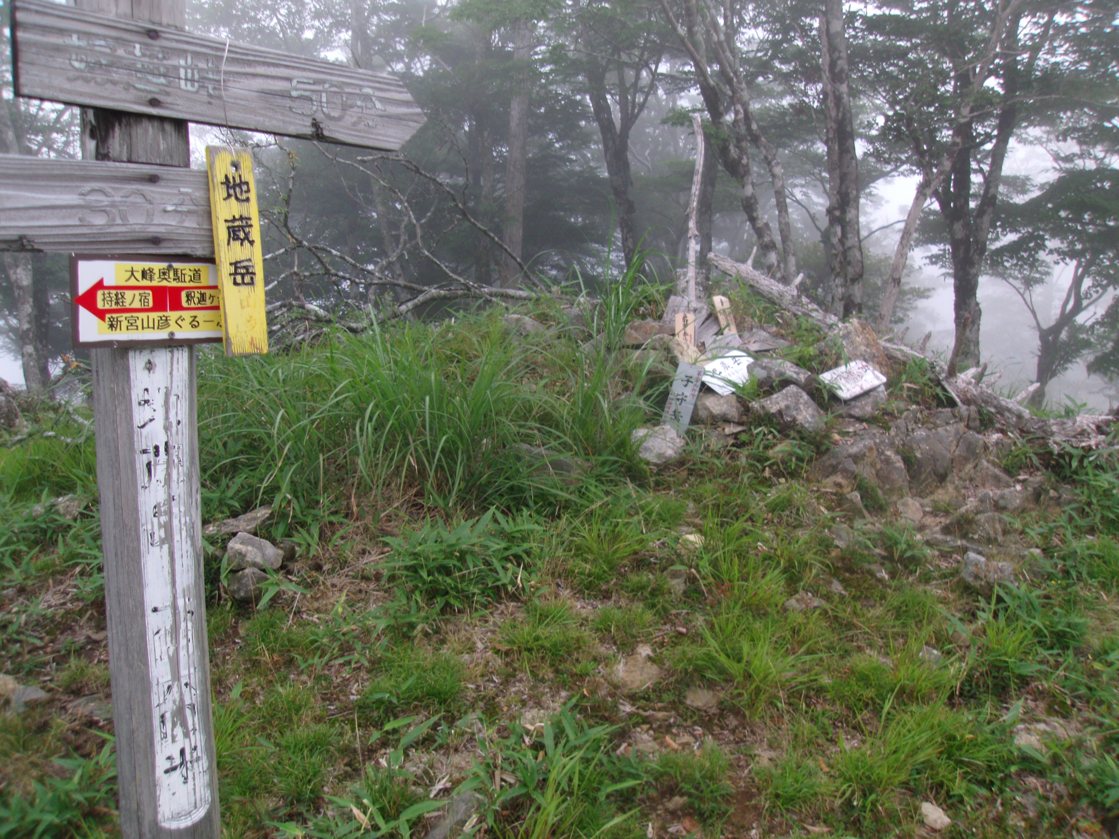 大峯奥駈道第26靡「子守岳（地蔵岳）」